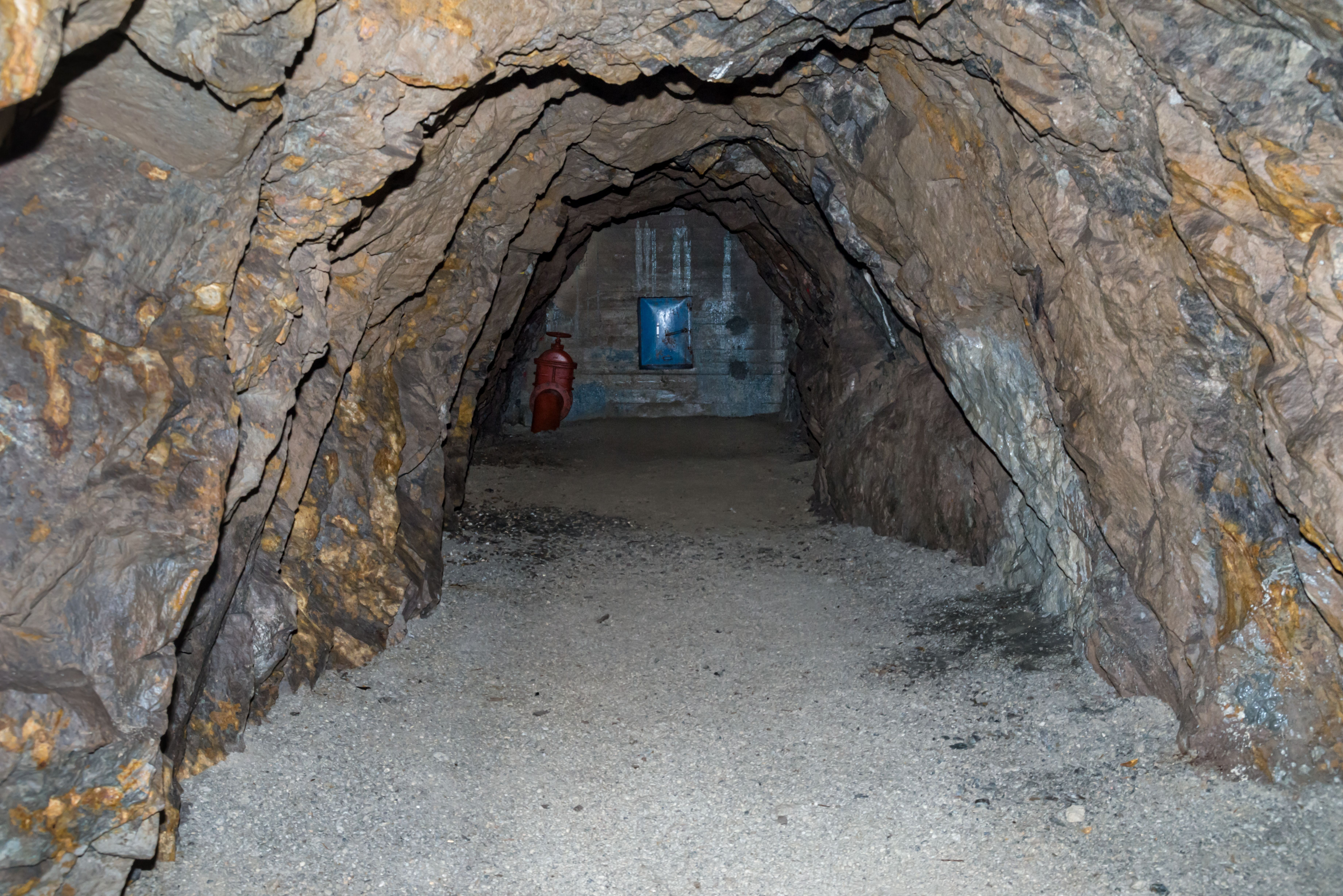 Die Einlagerung der Dokumente zum Grundgesetz und des Originals des "Grundgesetzes für die Bundesrepublik Deutschland" als Microfilm am 03. Oktober 2016. Das Grundgesetz ist das 1.000.000.000 Dokument (Bild) welches eingelagert wurde. Das Ende des Stollens, mit Wasserableitung und Tor zum Wassersammelbecken dahinter